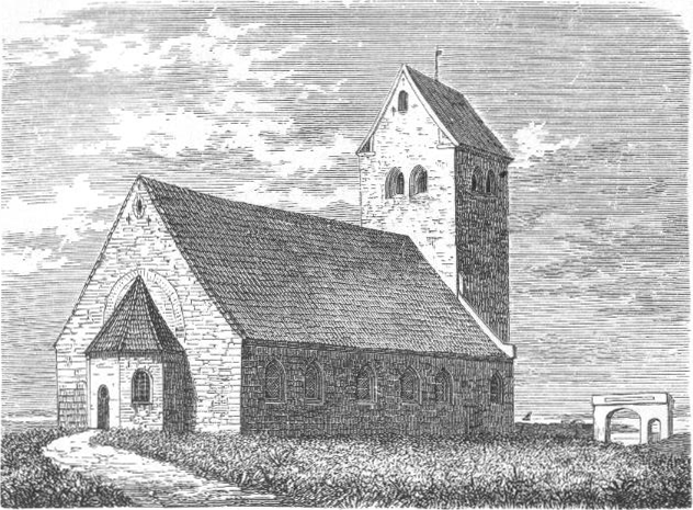 Vestervig Klosterkirke. Kirkens ældste Partier - Højkirkens Sidemure med Rundbuevinduer og vekslende runde og firkantede Søjler - ere fra det 12te Aarh. Senere Tilbygninger have ganske omdannet den oprindelige smukke og interessante Kirkebygning.